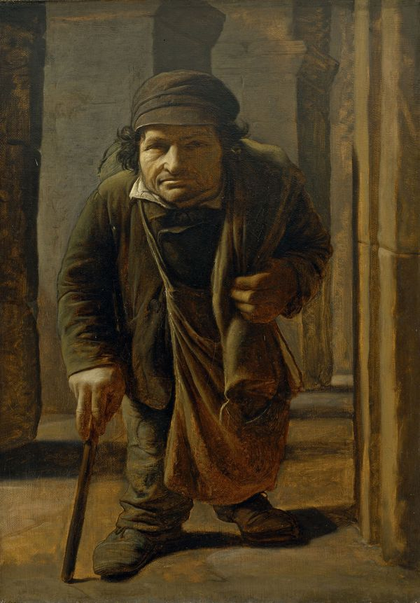 Portræt af en kludesamler. Den romerske dværg Francesco Colombo